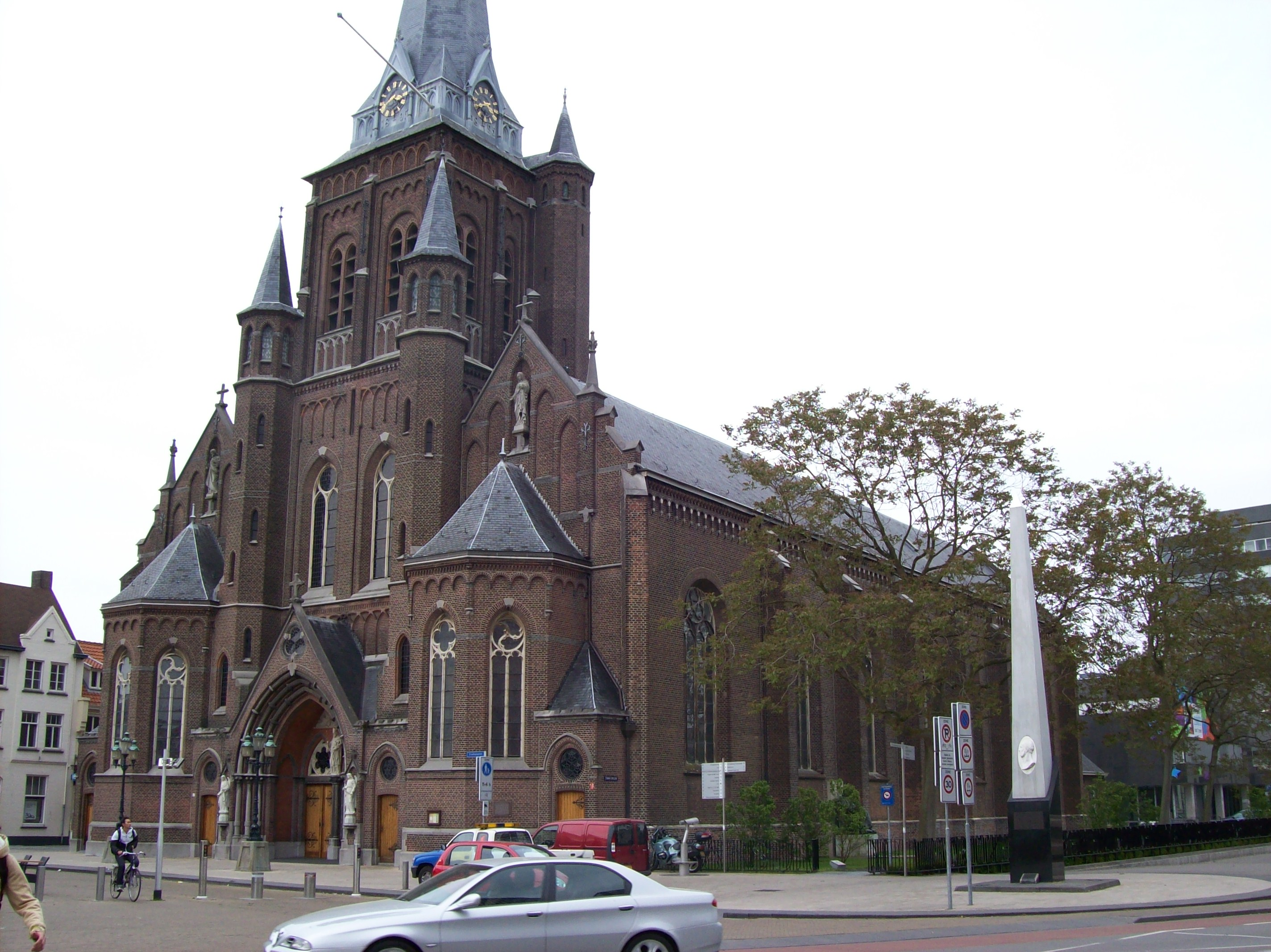 Kerk, Oude Markt, Tilburg